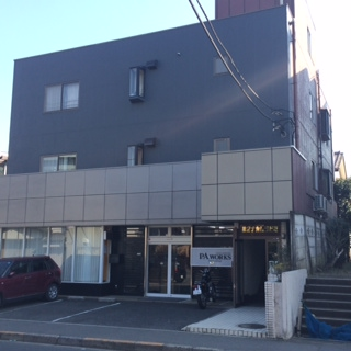 ピーエーワークス（東京スタジオ）（2015/03/12撮影）